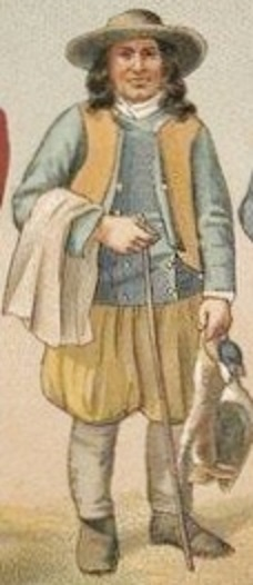 Homme de Pont-Croix : ce breton porte une soubreveste, la veste sans manches par-dessus ses autres vêtements. Son large haut-de-chausses de laine est pris aussi au-dessus du genou par des molletières en drap.